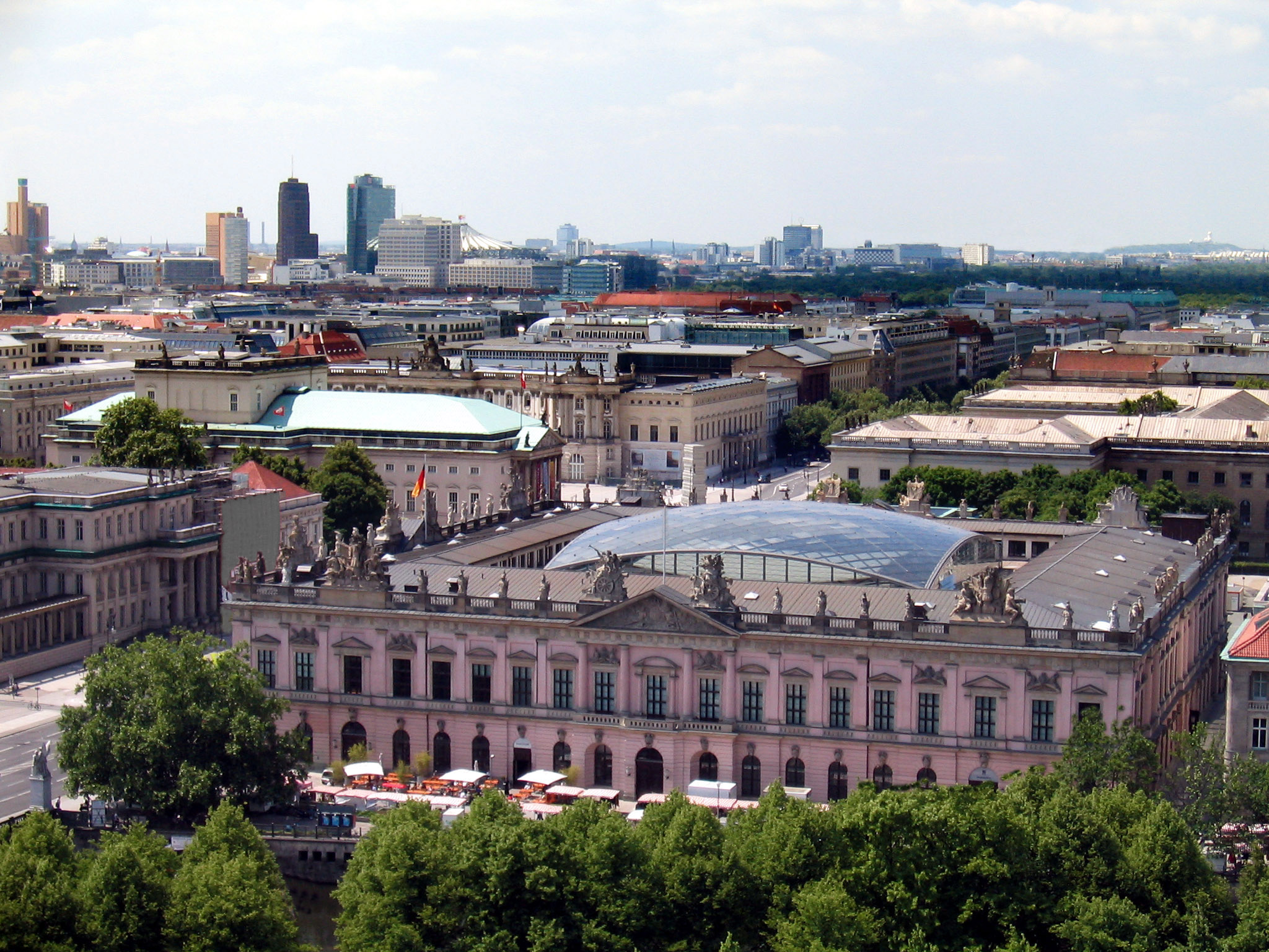 Blick auf das Historische Museum, dem ehemaligen Zeughaus in Berlin-Mitte. Auf der linken Seite liegt der Boulevard Unter den Linden. Im Hintergrund ist der Potsdamer Platz sichtbar.